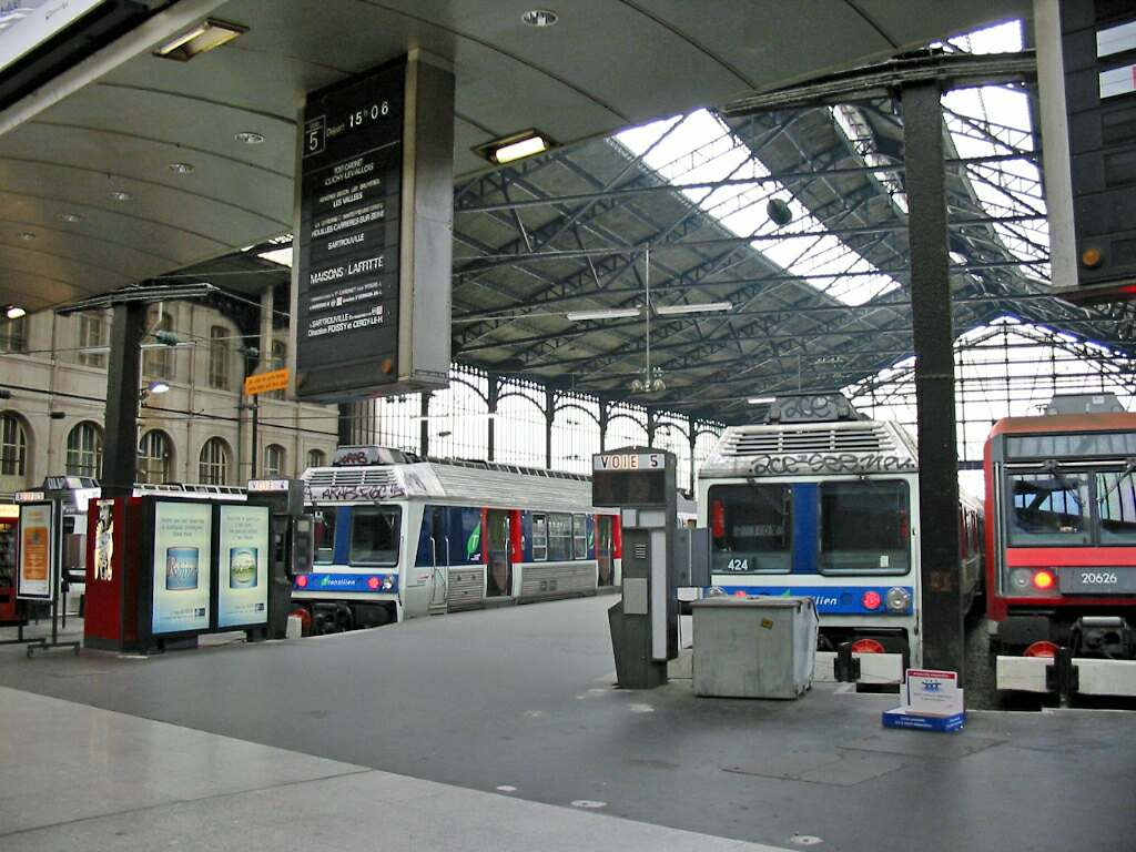 Gare Saint-Lazare (Paris) vue partielle des quais Photo JH Mora, août 2005 Catégorie:Gare parisienne